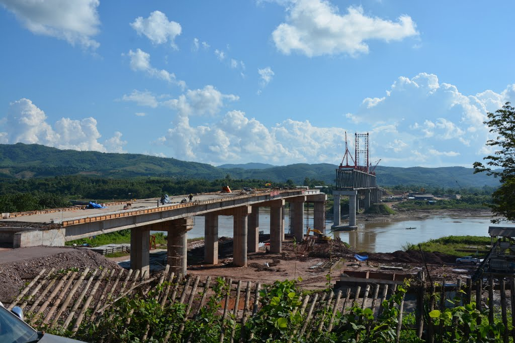 ラオスミャンマー友好橋です、建設中ですね。